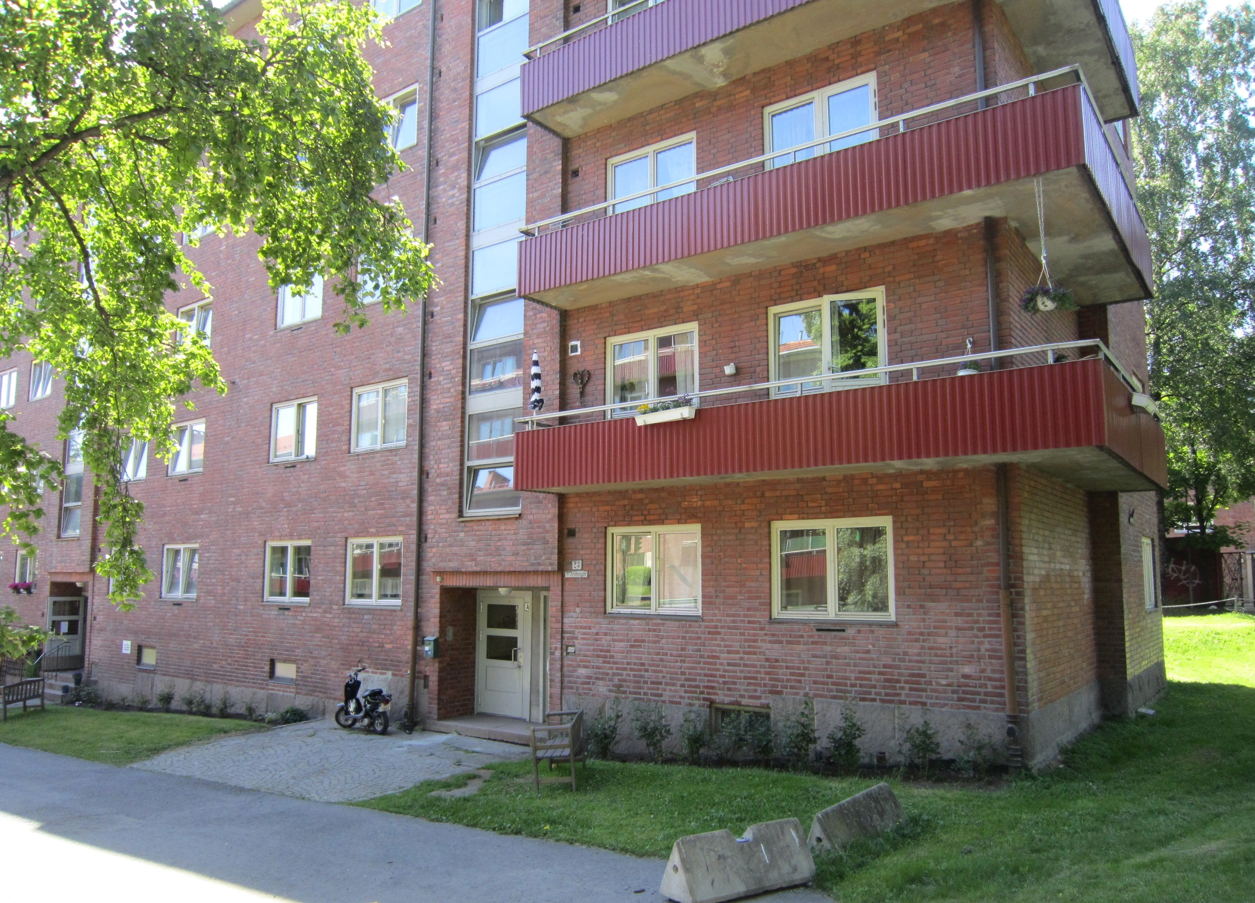 Christies gate i enden mot Christian Michelsens gate